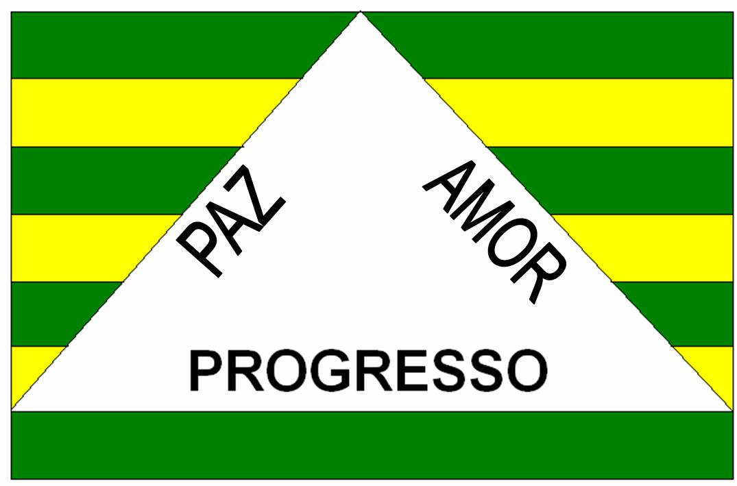 Bandeira do município de Ferros, Minas Gerais, Brasil.